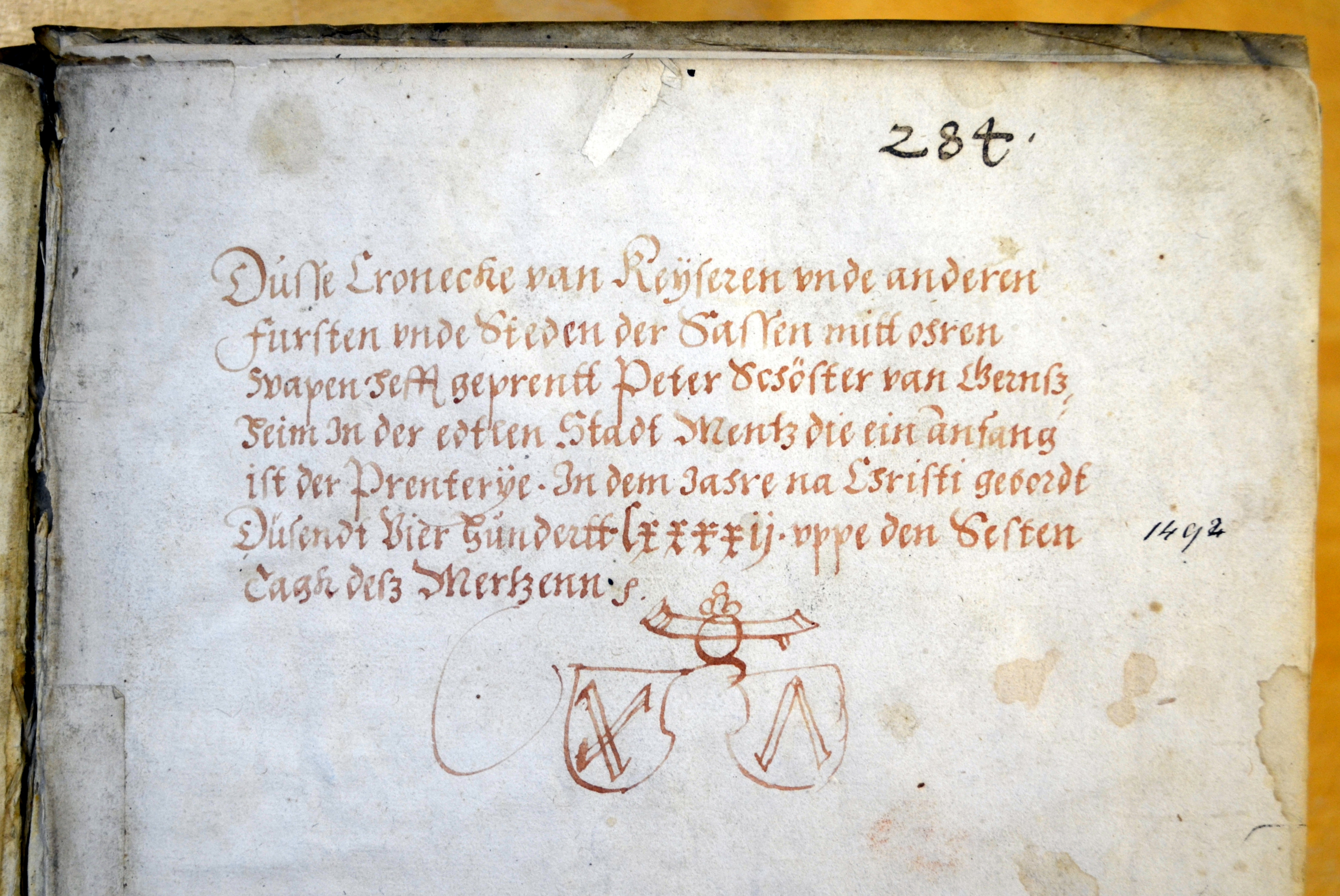 Sachsenchronik von entweder Cord Bote oder Hermann Bote aus dem Jahre 1492: Kolophon des Druckers Peter Schöffer.